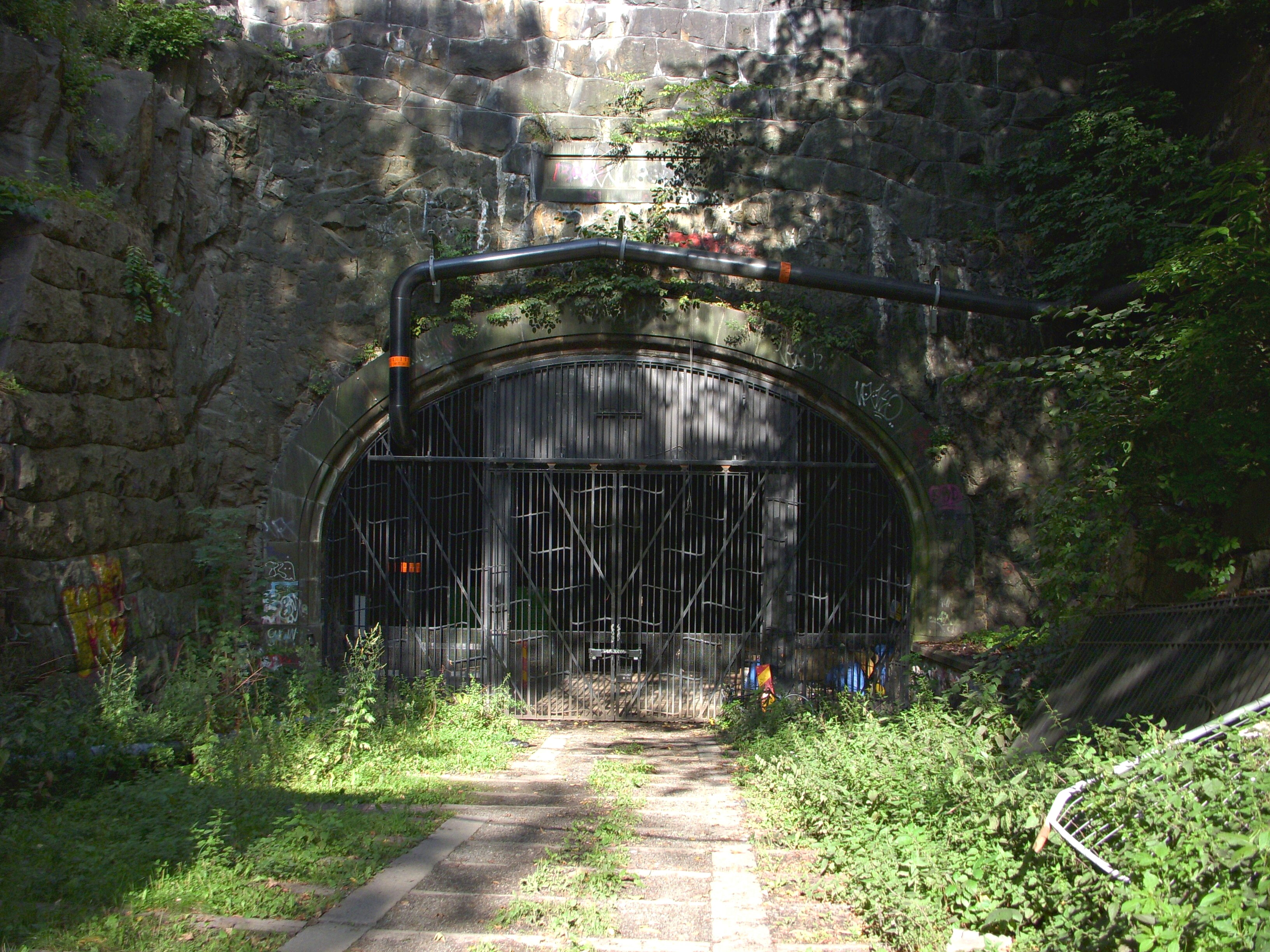 Sammanbindningsbanans södra tunnel under Södermalm (numera nedlagd)